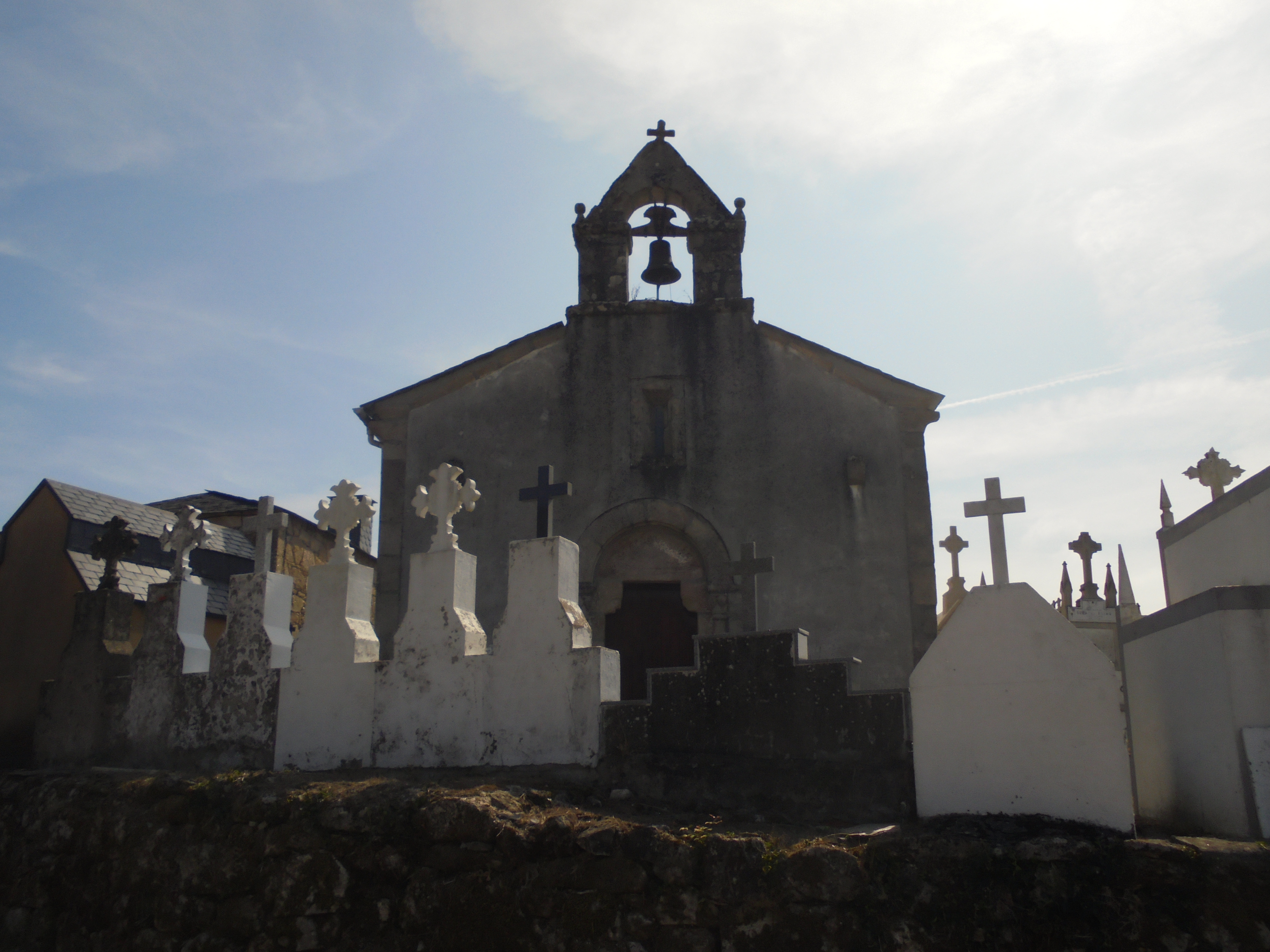 Igrexa parroquial de San Martiño de Oleiros